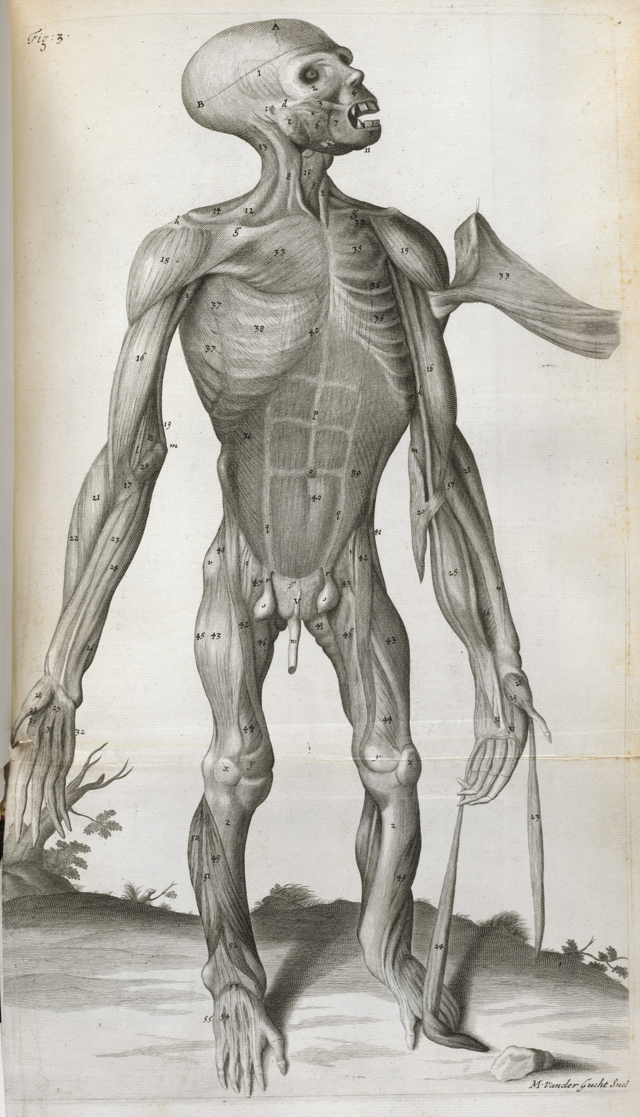 Anatomical drawing An anatomical drawing.